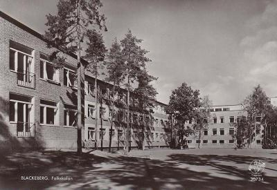 Blackebergs folkskola, Björnsonsgatan 132, Bromma, vykort 1959. Skolan byggdes 1951 och arkitekt var Åke E. Lindqvist.